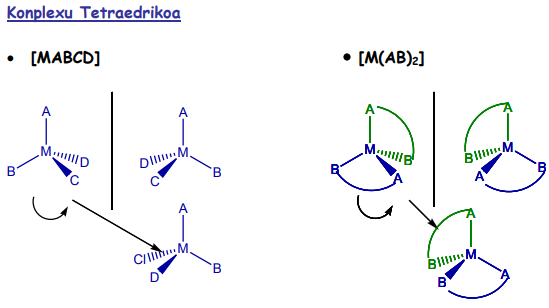 Konplexu tetraedrikoa